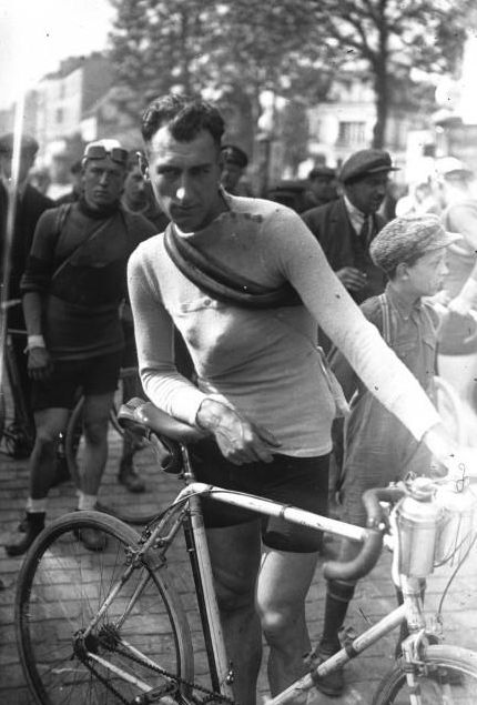 Portrait de Hamel, de l'équipe olympique.